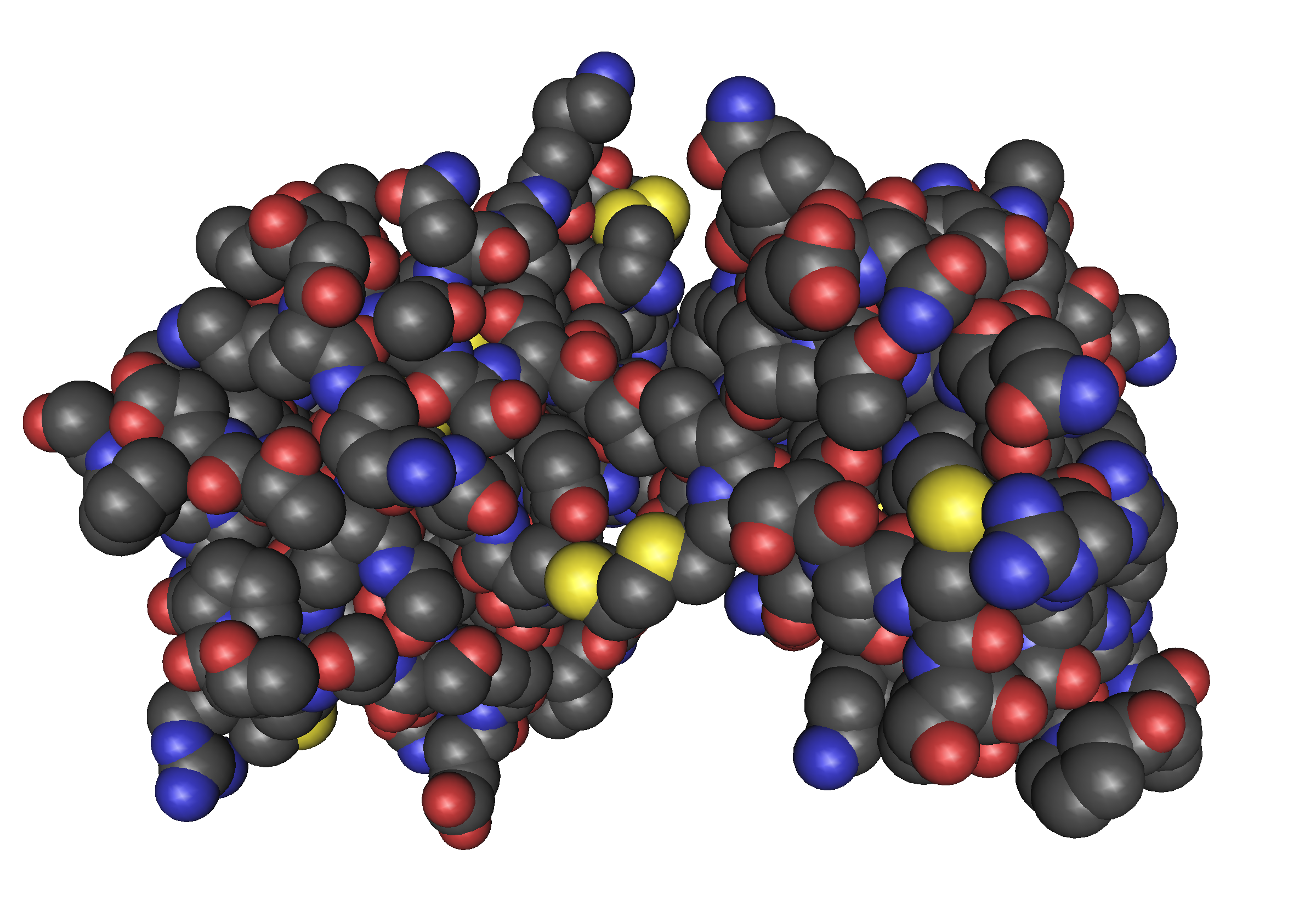 1PMK Plasminogen Kringle 4